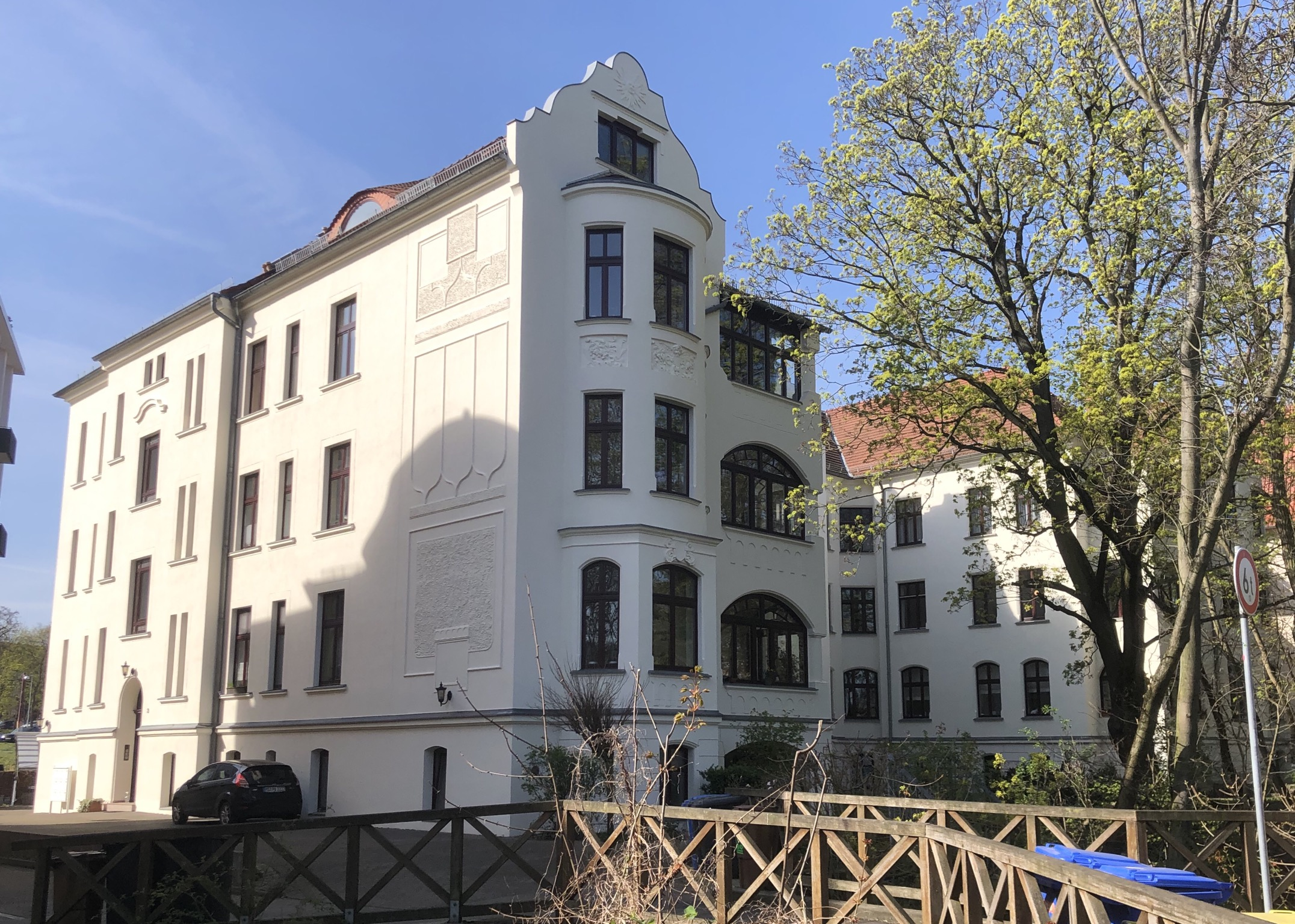 Benediktinerstraße 3